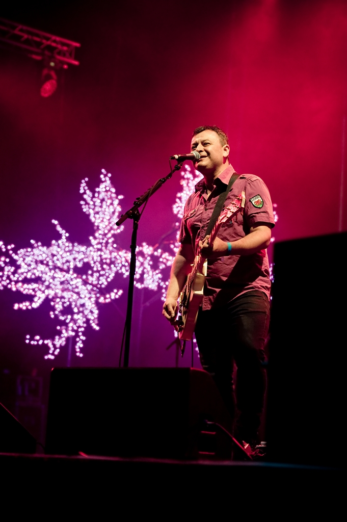 Manic Street Preachers Õllesummeril 2012